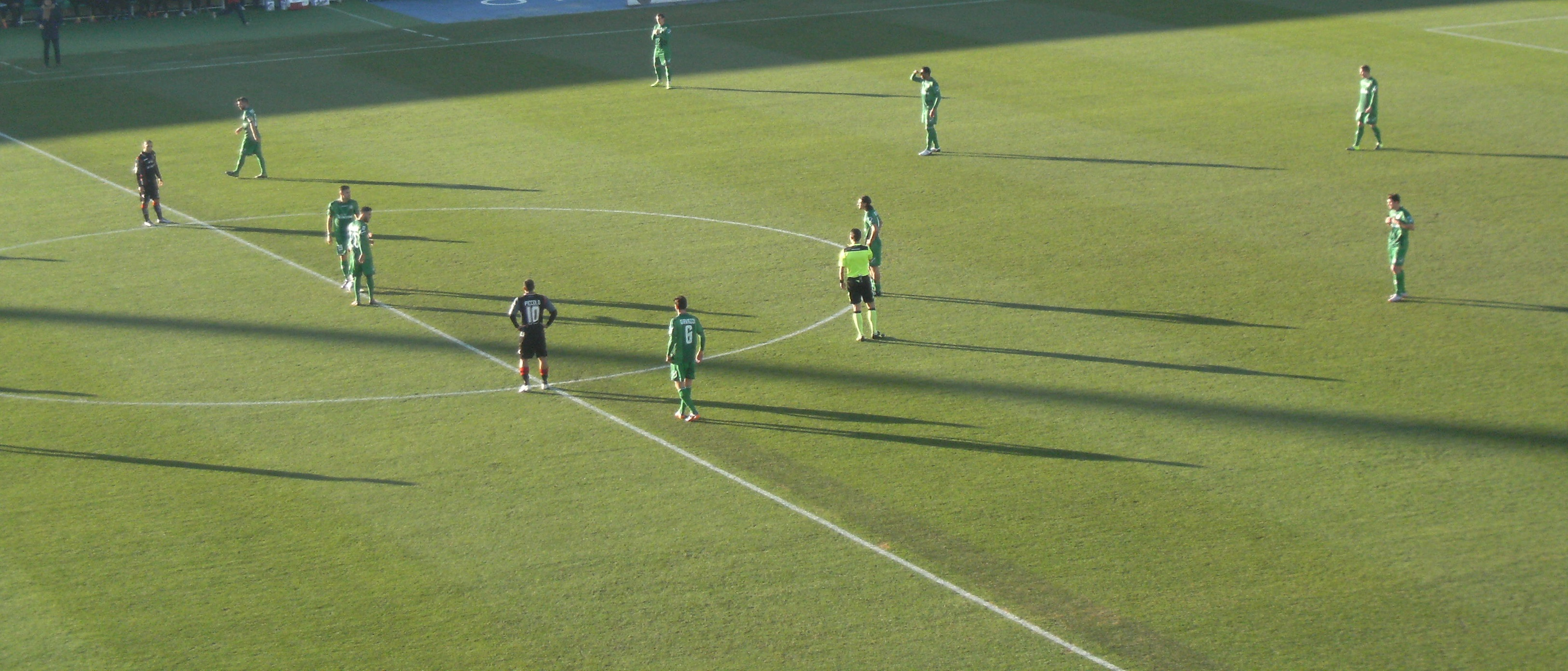 Fase di gioco dell'incontro Avellino-Virtus Lanciano valido per il campionato di serie B 2015/2016.